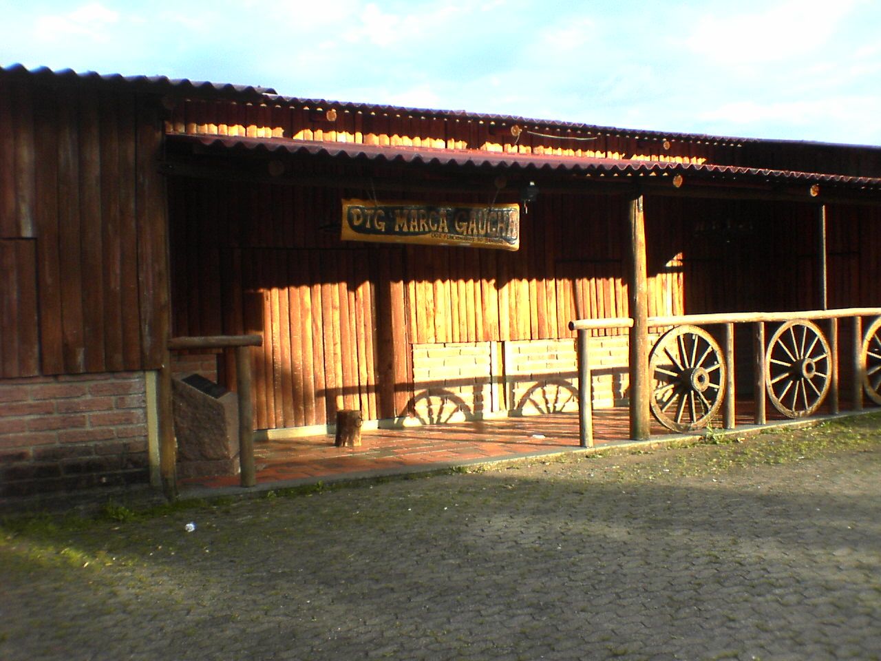 Departamento de Tradições Gaúchas do Centro Social e de Treinamento do Banrisul